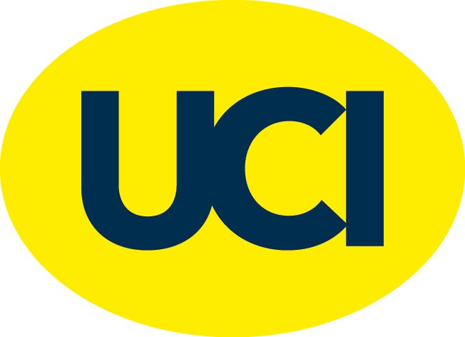 UCI Multiplex GmbH Logo